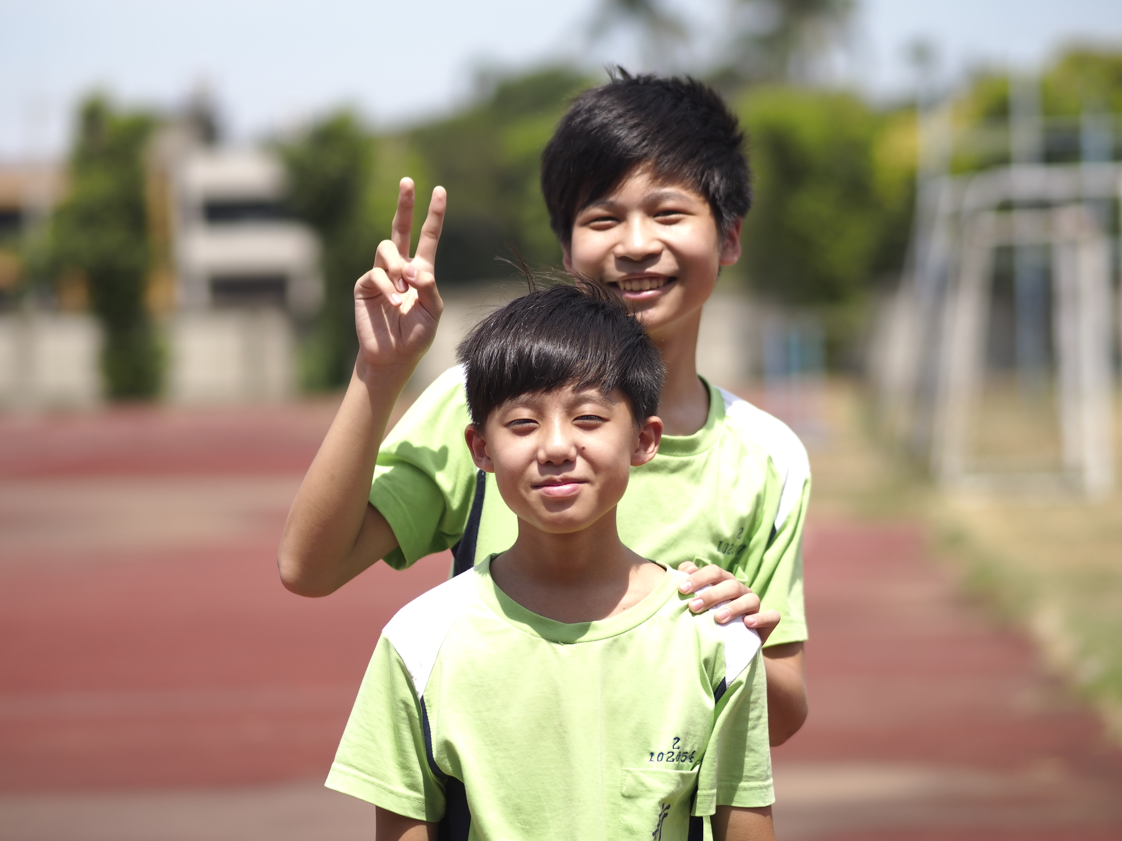 兩個新竹縣新湖國中男生。